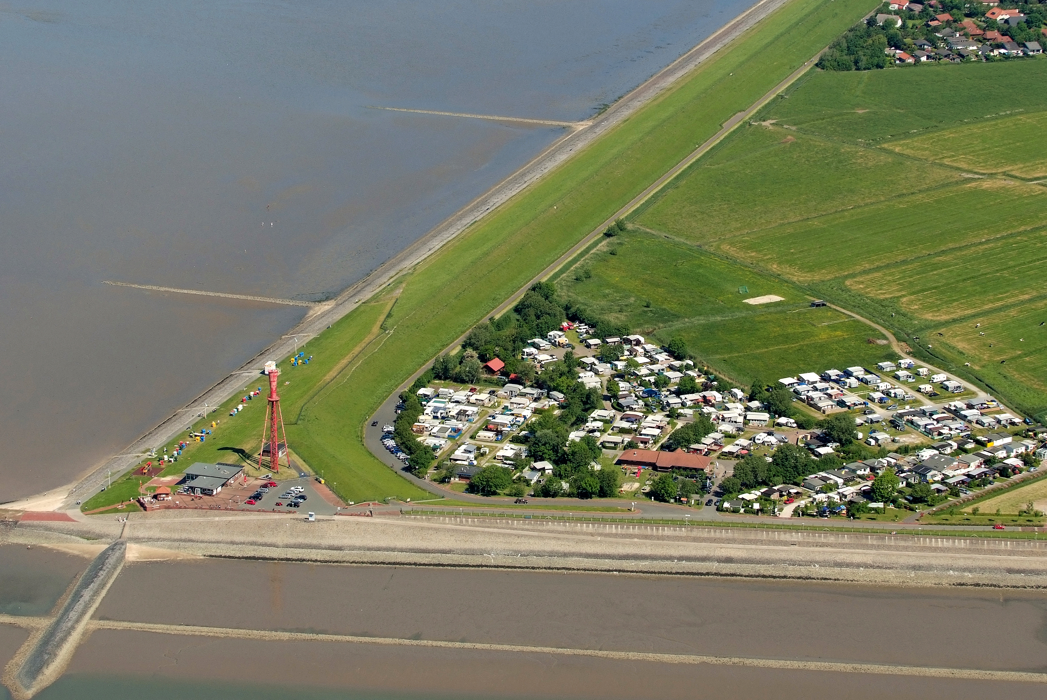 Eckwarderhörne mit Seezeichen und Campingplatz (Fotoflug vom Flugplatz Nordholz-Spieka über Cuxhaven und Wilhelmshaven)